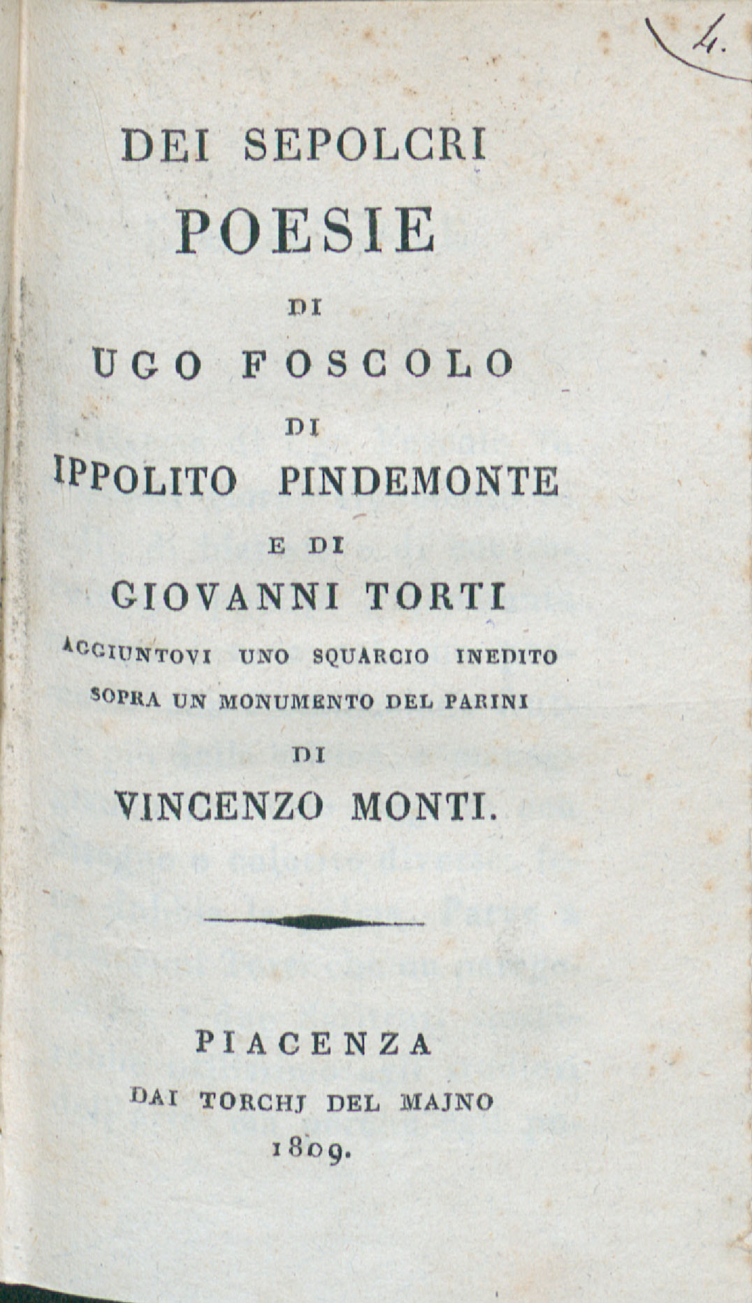 Dei sepolcri poesie di Ugo Foscolo di Ippolito Pindemonte e di Giovanni Torti aggiuntovi uno squarcio inedito sopra un monumento del Parini di Vincenzo Monti. - Piacenza : dai torchj del Majno, 1809. - X, 64 p. ; 8°. - Segn.: [pigreco]2 (-[pigreco]2) (1)-(9)/4 . frontespizio